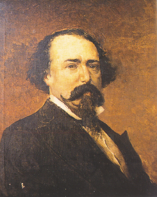 Retrato del escritor Adelardo López de Ayala (1828-1879)